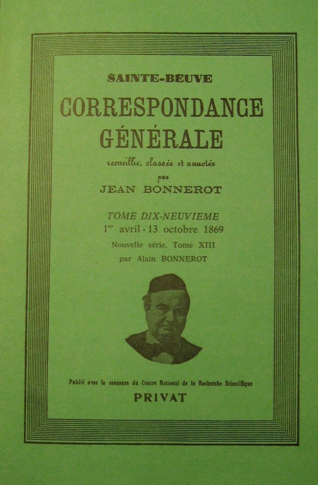 Photographie de la couverture Tome XIX , 13ieme de la nouvelle série publiée chez Privat. Ce Volume a été édité par le fils de Jean Bonnerot, Alain Bonnerot